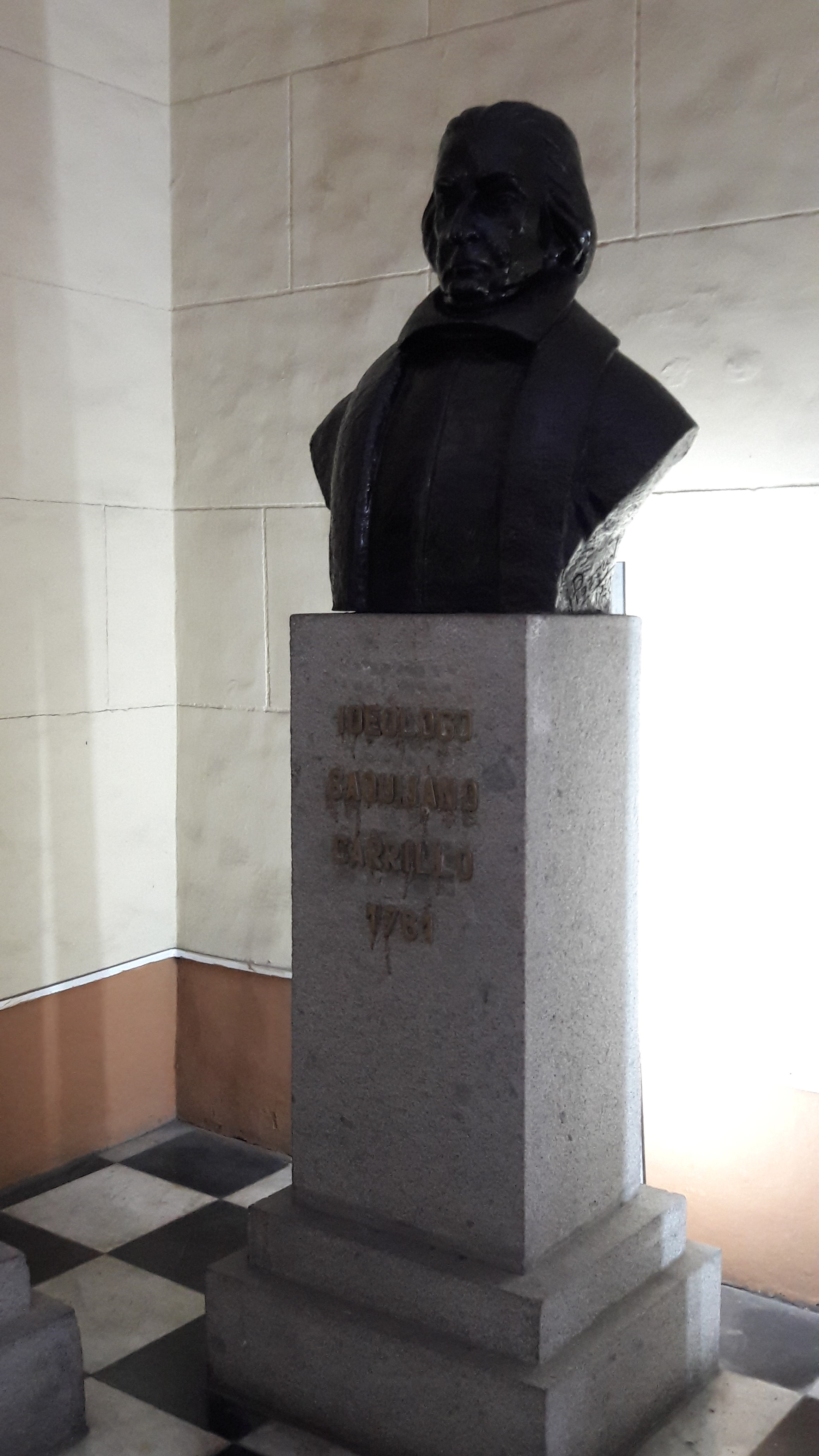 Ideologo Baquijano Carrillo 1781